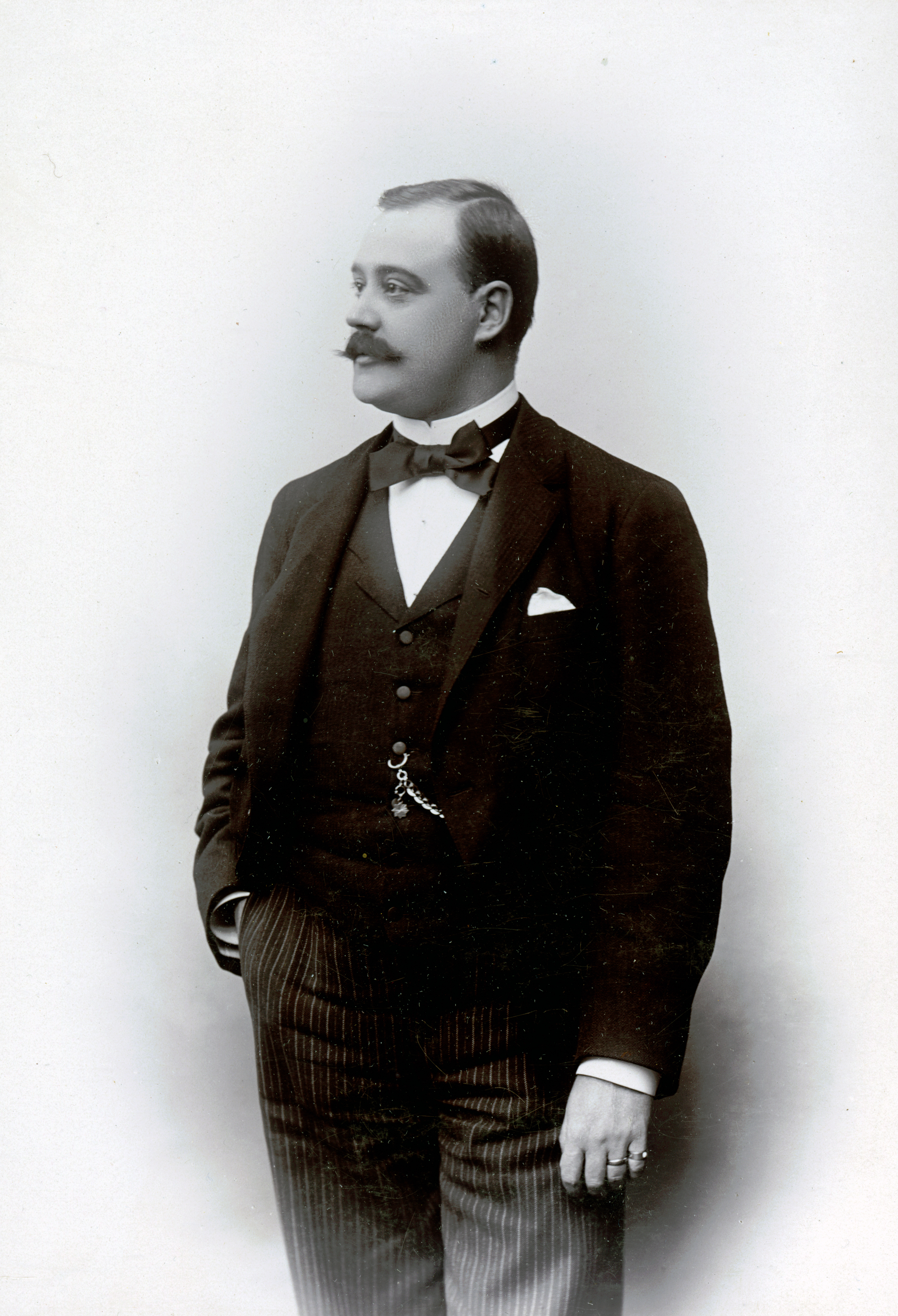 Oscar Byström, skådespelare vid Kungliga Dramatiska teatern 1892